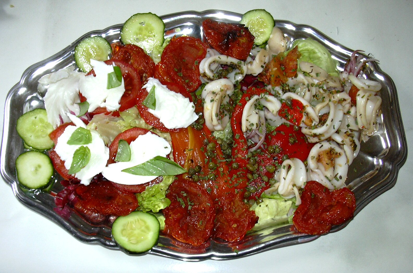 antipasti